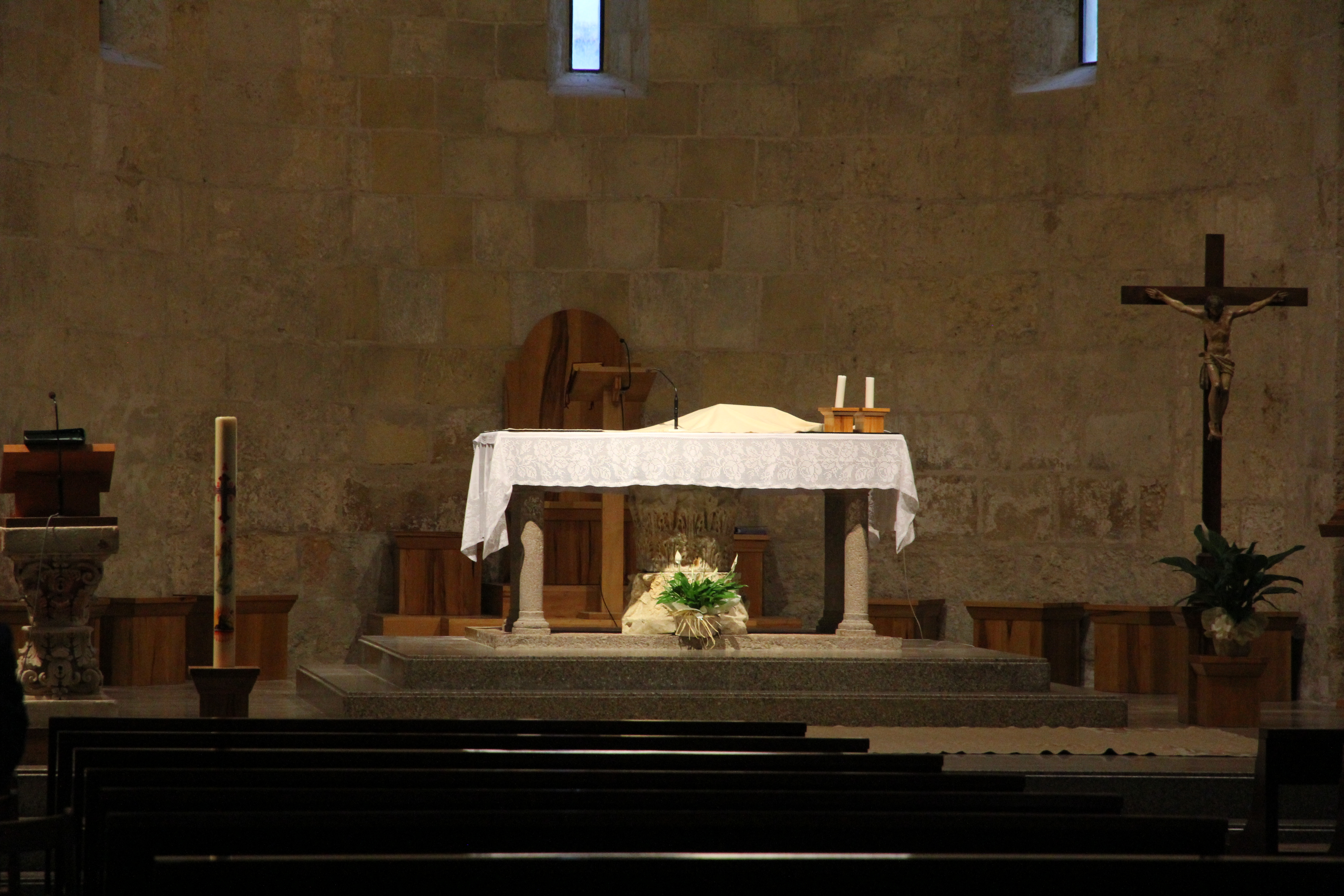 Porto Torres - Basilica romanica di San Gavino